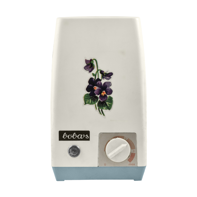 Podgrzewacz do butelek dla dzieci, 1975 rok. Ówczesna nazwa producenta: PZPE Kontakt.